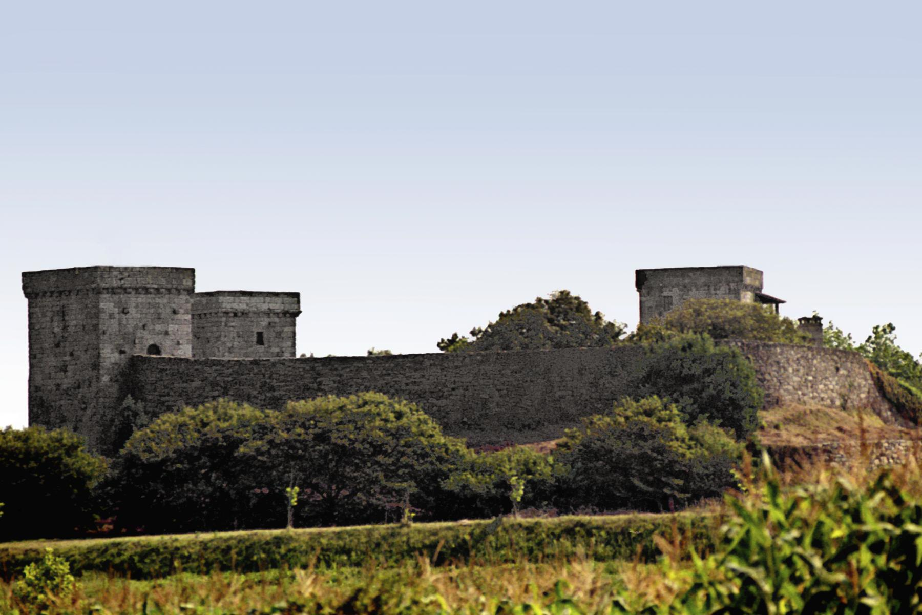 Torres de Mens, Malpica de Bergantinos, Galicia